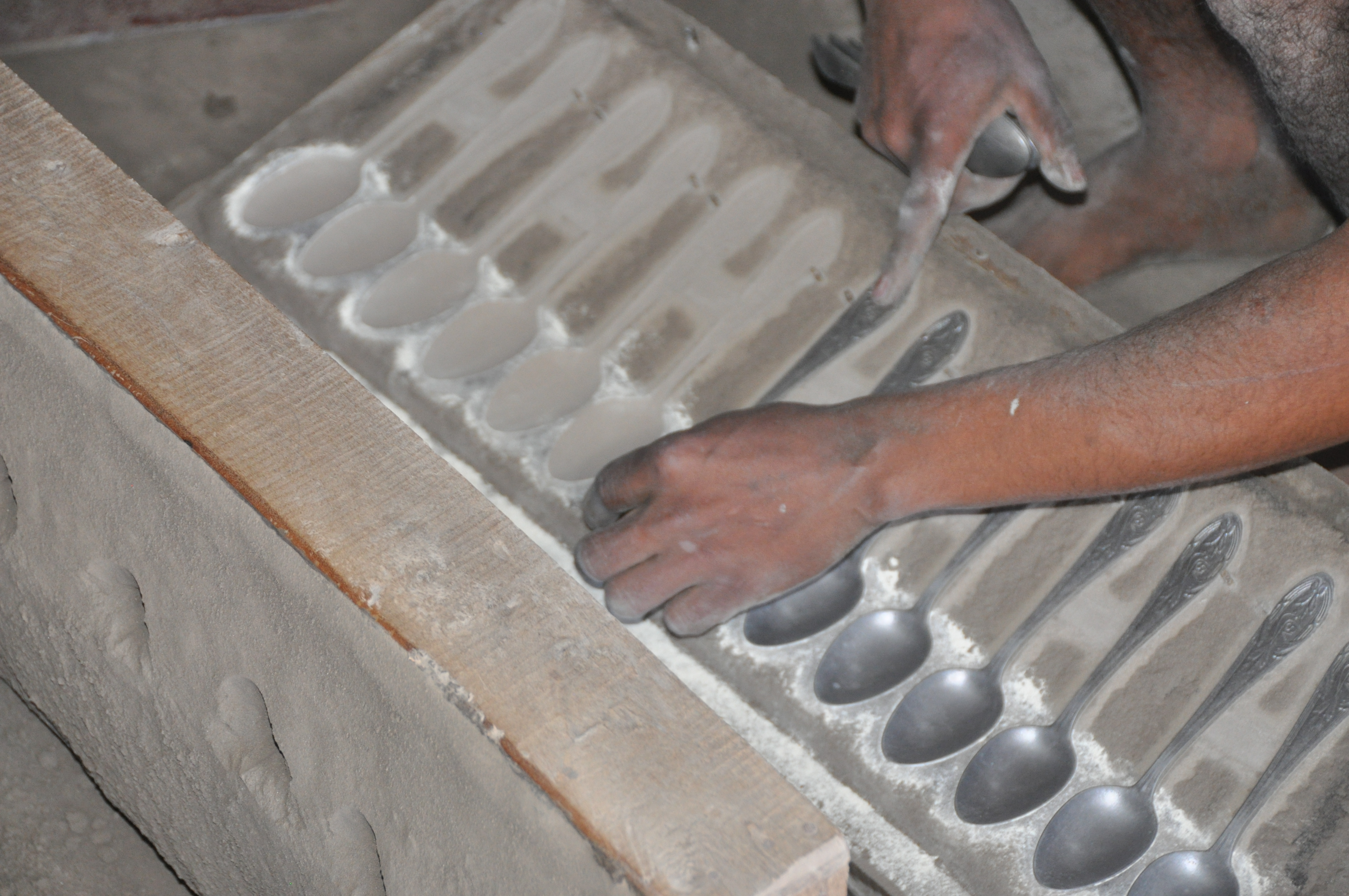 entre Tananarive et Antsirabe : Ambatolampy This is an image of "African people at work" from Madagascar